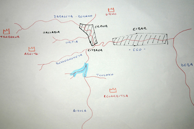 Ego errekaren arroa eta iturburu nagusiak. Eskuz egindako hurbilpen txiki bat.